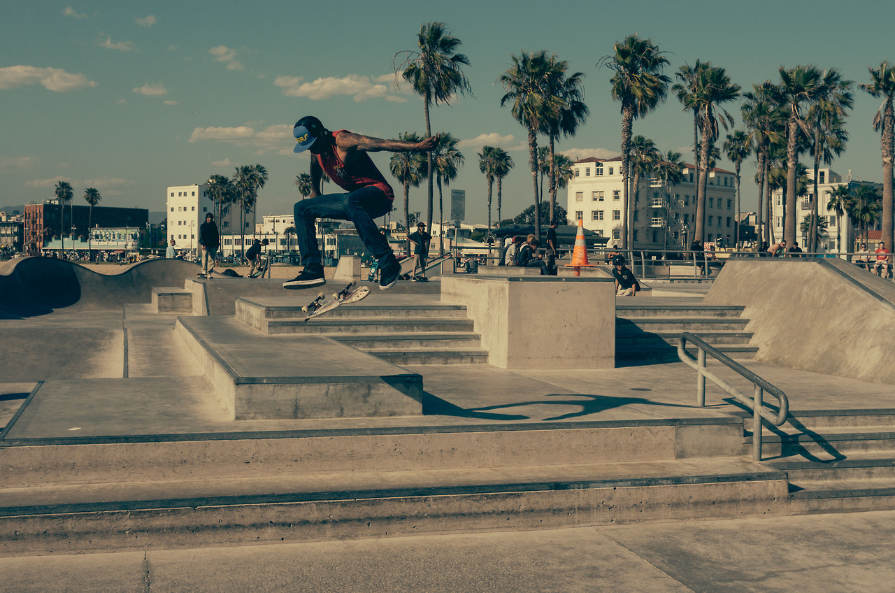 Skutisto transsaltas.